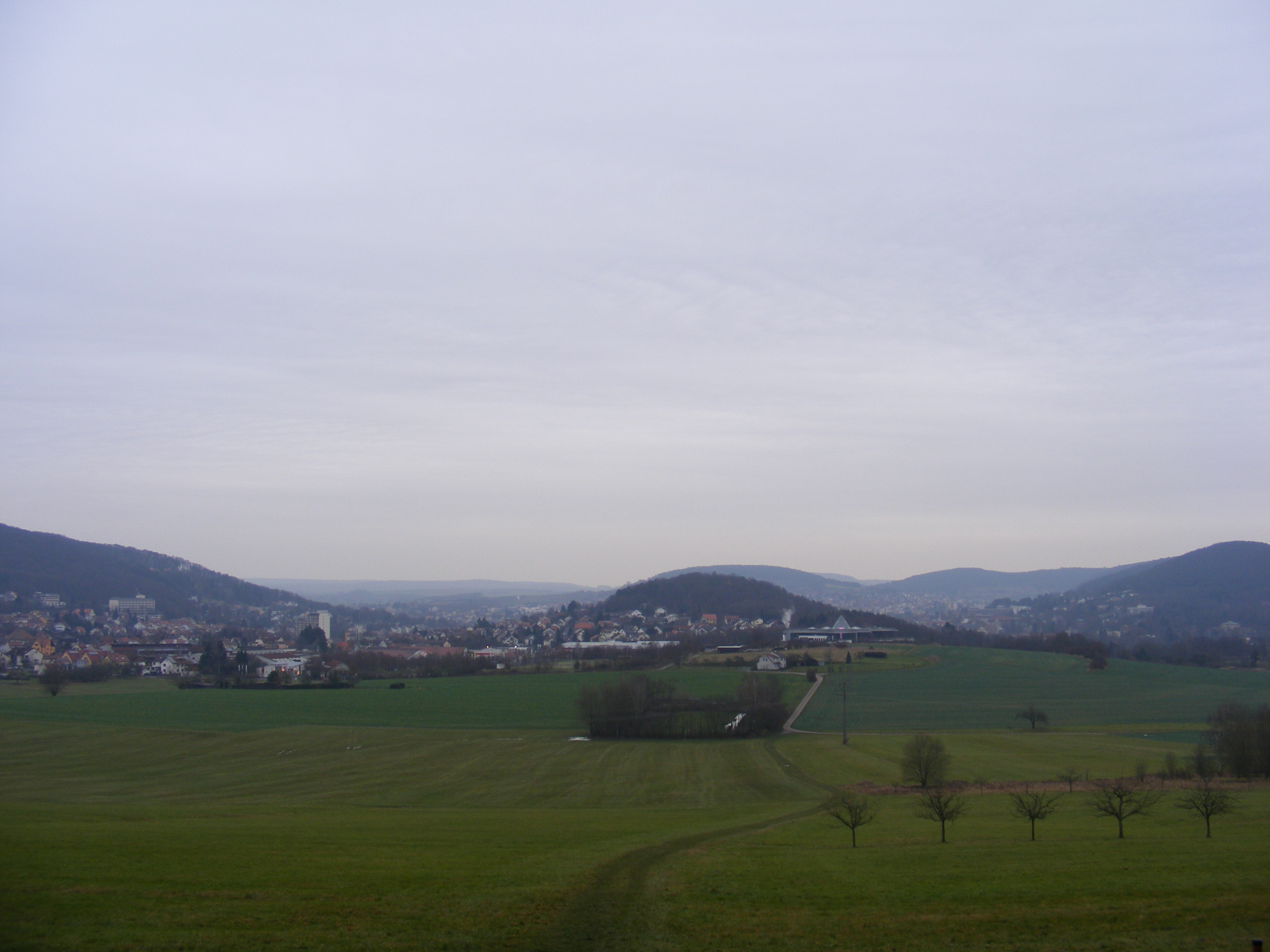 Bad Kissingen-Garitz vom Stadtwald gesehen (Kapelle am Weg der Besinnung). Teil 1